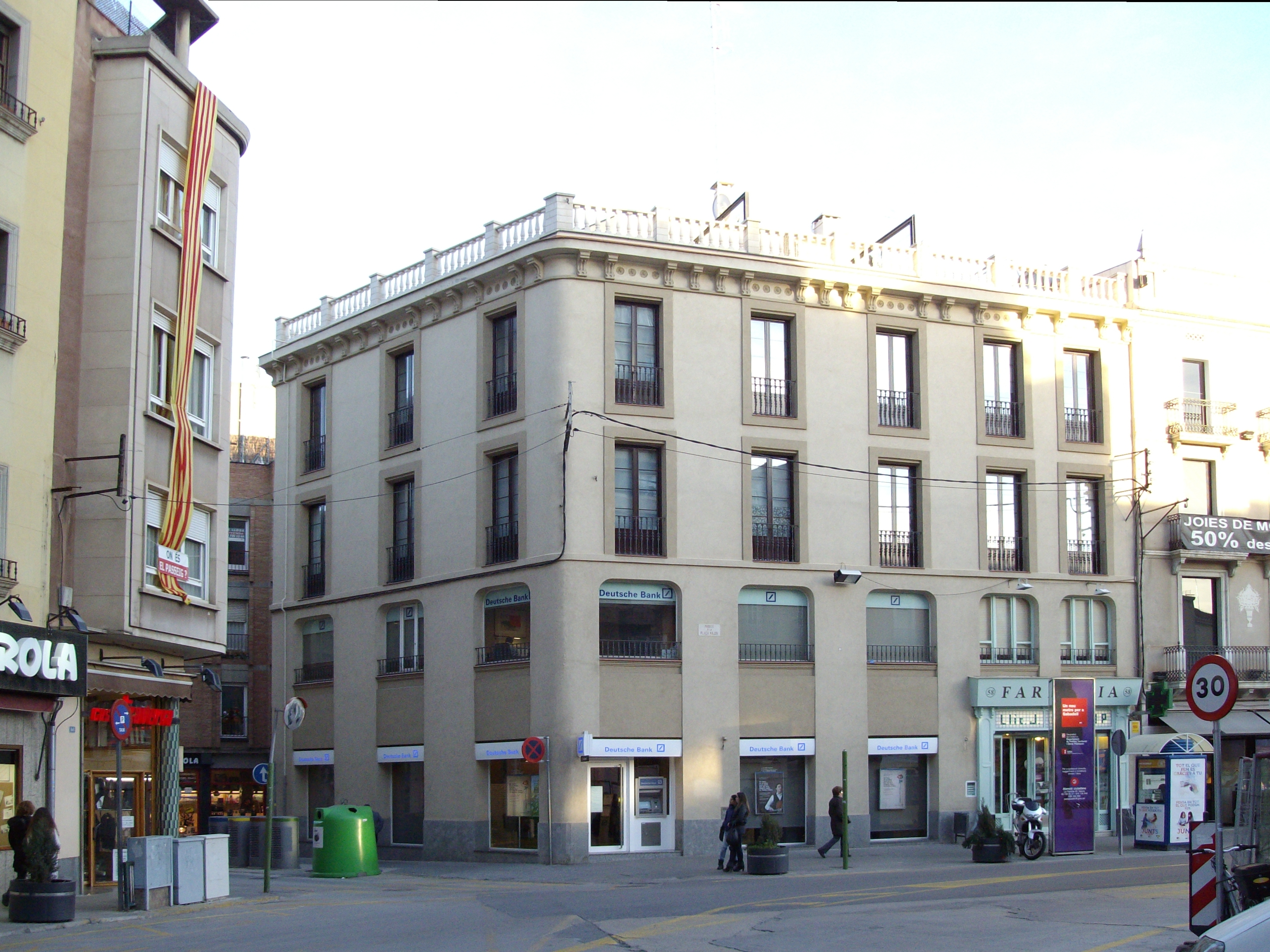 Casa Vicente Ferrer, construida en 1901 por Juli Batllevell, en los bajos del edificio se encontraba la droguería "Las Drogas" (actual Deutsche Bank). Al año siguiente se derriba la casa contigua y se ensancha el edificio, instalando en sus bajos la farmacia "La Barcelonesa" (actual farmacia Llop). El edificio ha sido muy transformado, está situado en el paseo de la Plaza Mayor, 58-60, en Sabadell, Barcelona (España).